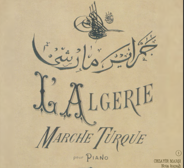 cezayir marşı nota kapağı